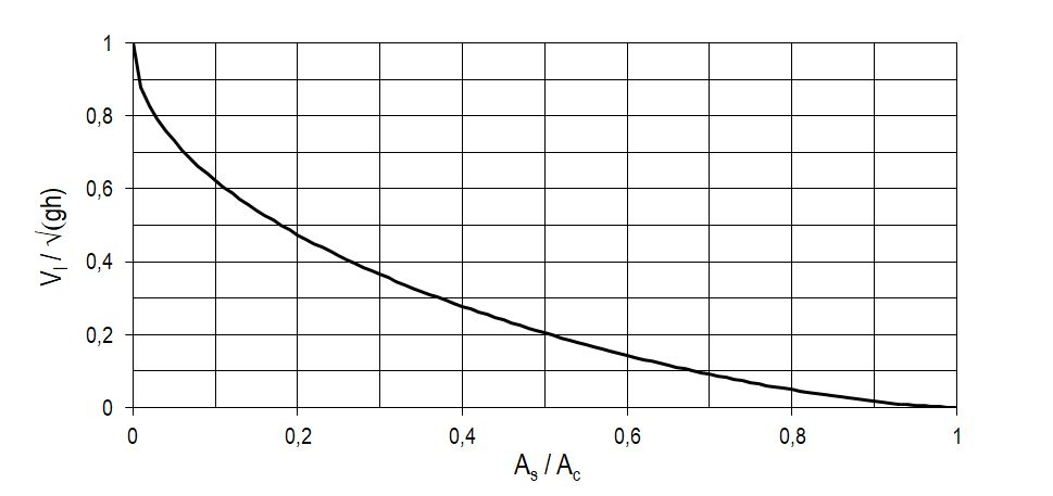 De grenssnelheid van schepen als functie van de blokkering van het dwarsprofiel van een kanaal, volgens de methode Schijf(1949) As = dwarsdoosnede schip, Ac=dwarsdoorsnede kanaal